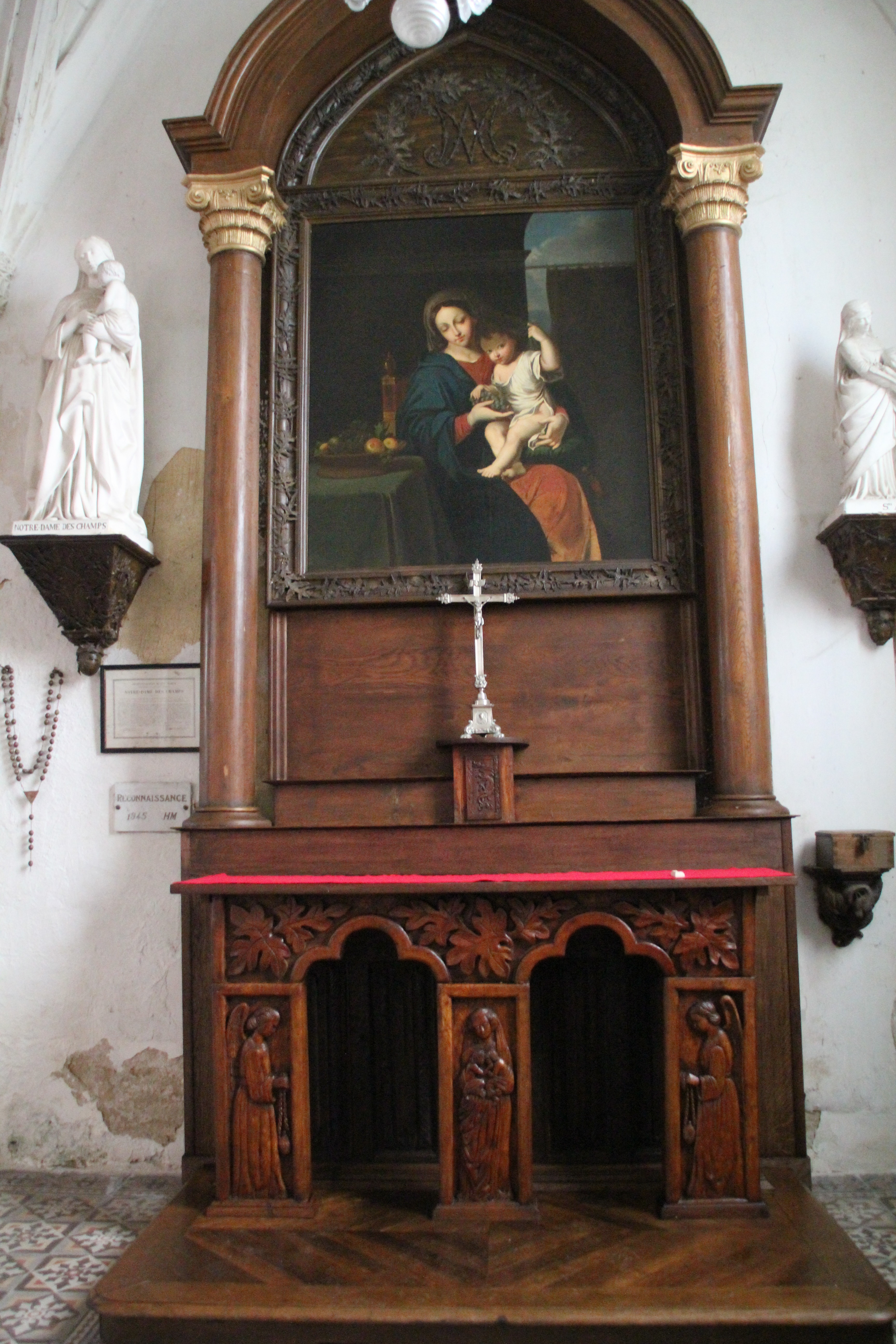 Copie Vierge à la grappe Mignard Musée du Louvre (XVII è s)